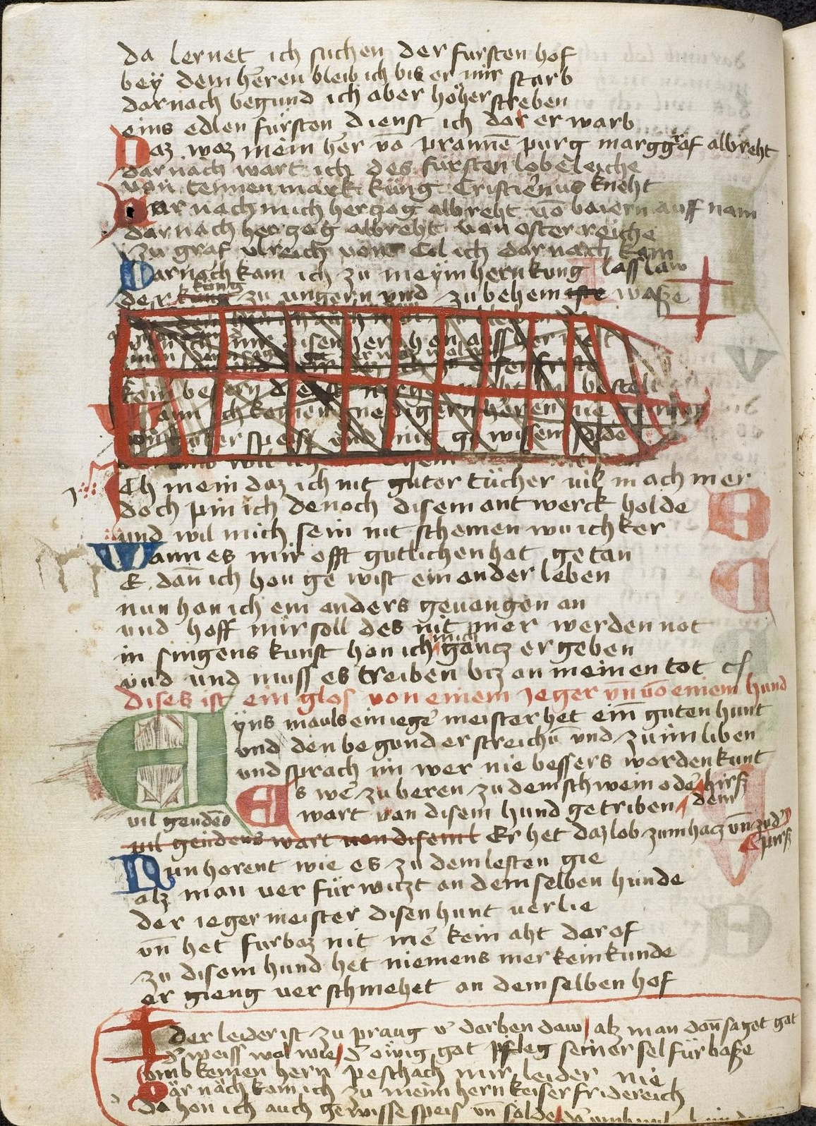 Michael Beheim: Lieder. Wien/Heidelberg (?), 1457-1465. Heidelberg, Universitätsbibliothek, Cpg 312, Bl. 24v